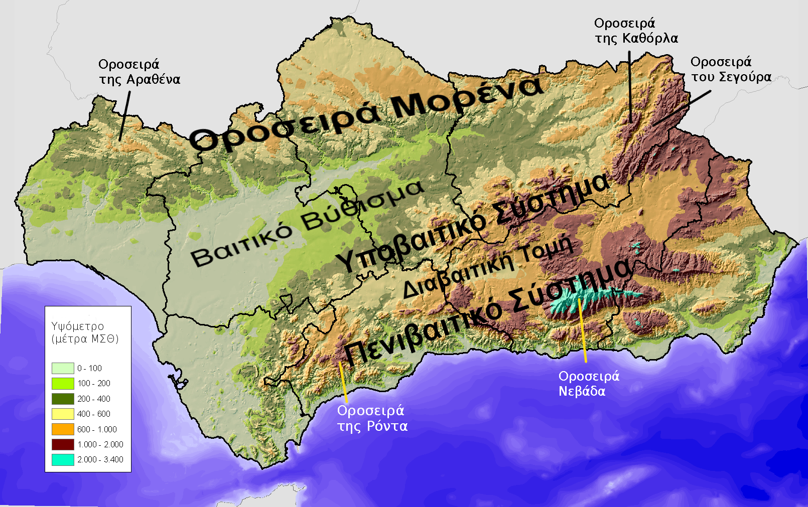 Ορογραφικός χάρτης της Ανδαλουσίας με τις κύριες μορφολογικές ενότητες.